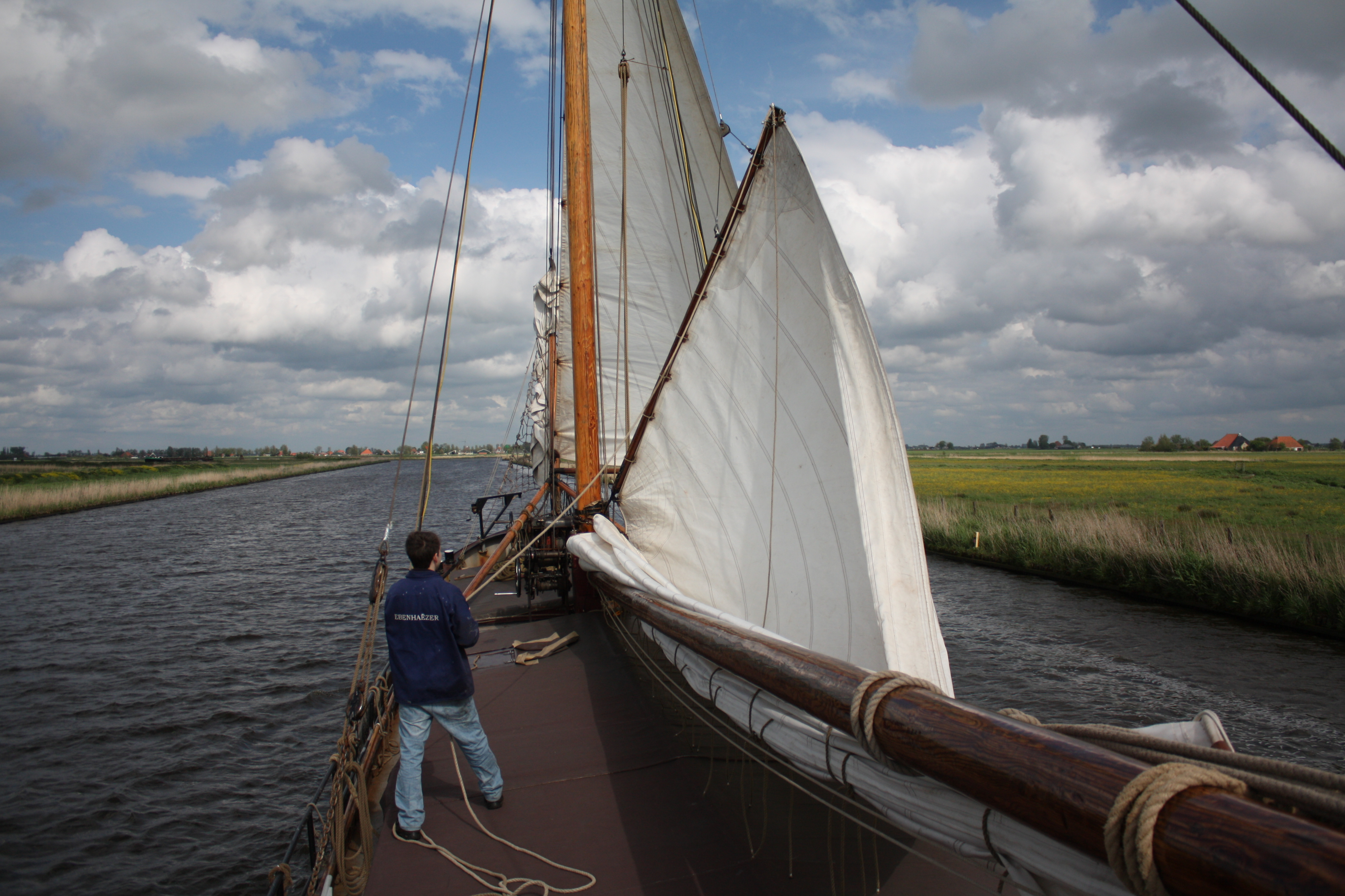 Kanaaltuig op de klipperaak Ebenhaëzer.